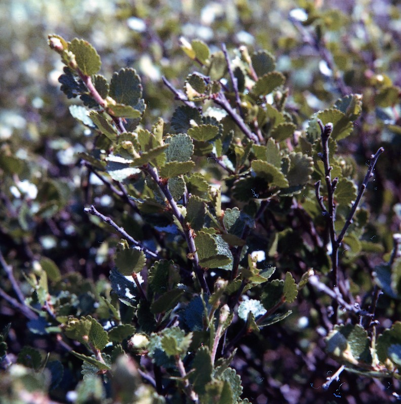 Photo du Bouleau nain (juin 1972), dans la tourbière du Cachot, canton de Neuchâtel, Suisse